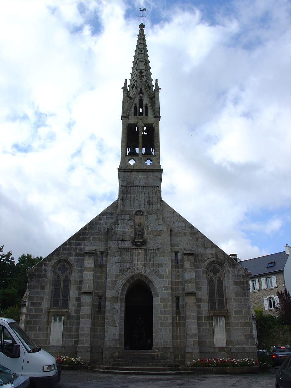 Chiesa di Saint Joseph